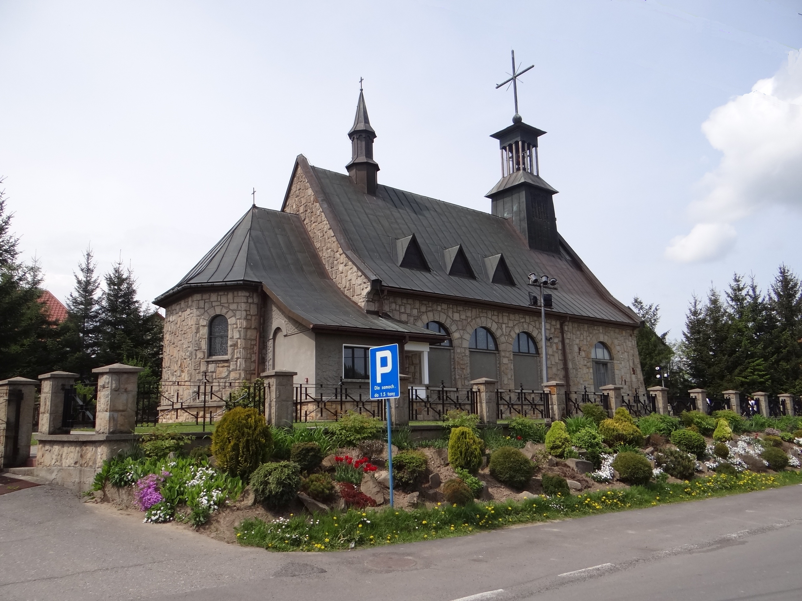 Kościół w Niedźwiedzy